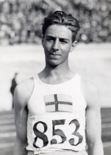 Sport, Olympische Spelen Amsterdam, 1928 : Olympisch kampioen speerwerpen, de Zweed Erik Lundquist.